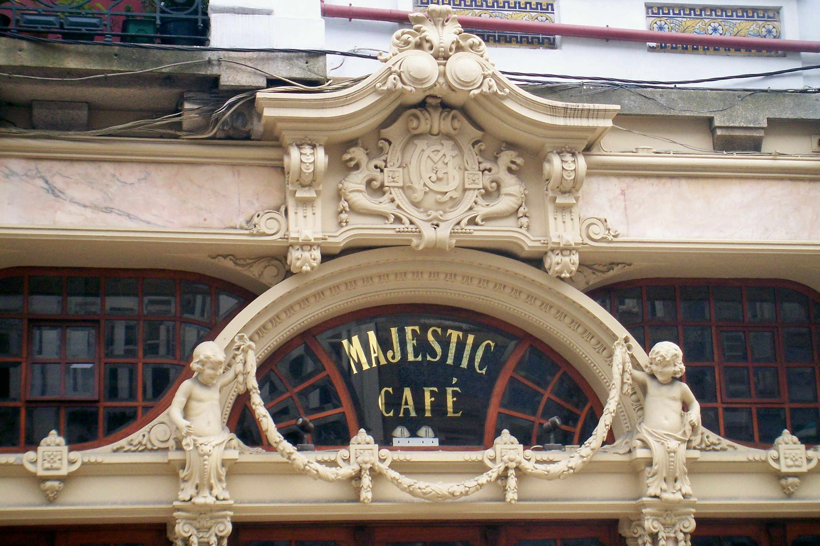 Porto